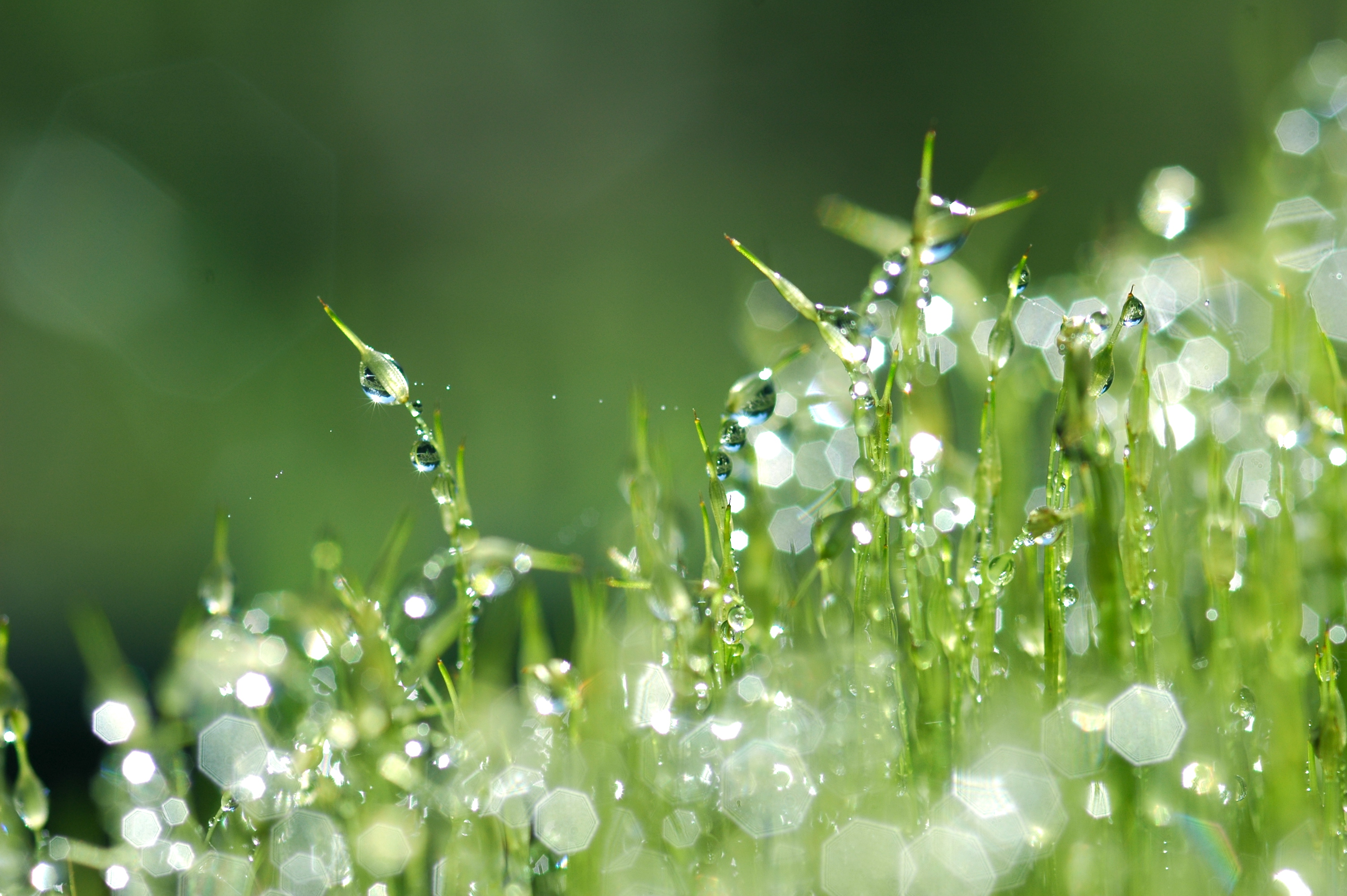 Wassertropfen in Moos